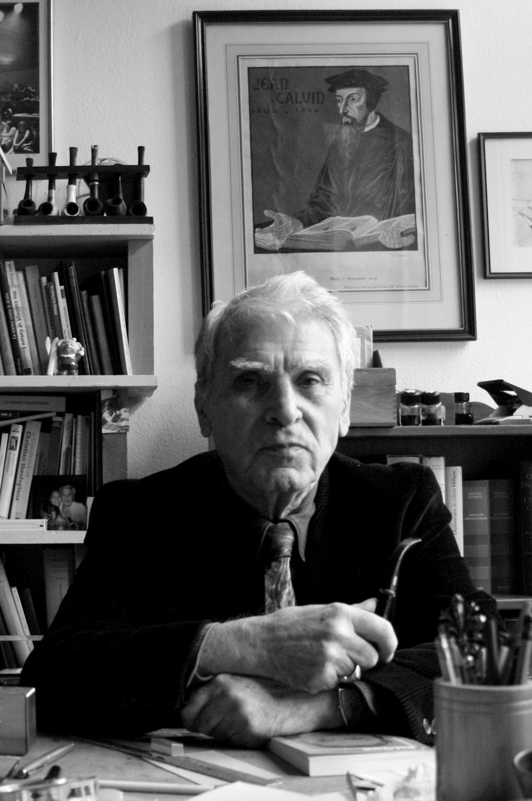 Le professeur de théologie protestante Gabriel Vahanian dans son bureau.